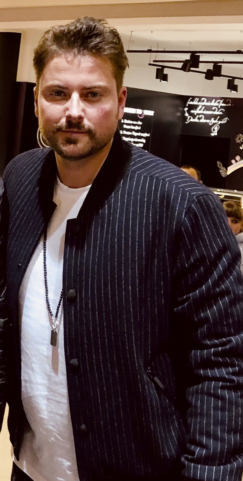 Felix von Jascheroff während einer Autogrammstunde im Famila Einkaufszentrum in Oldenburg (2019)